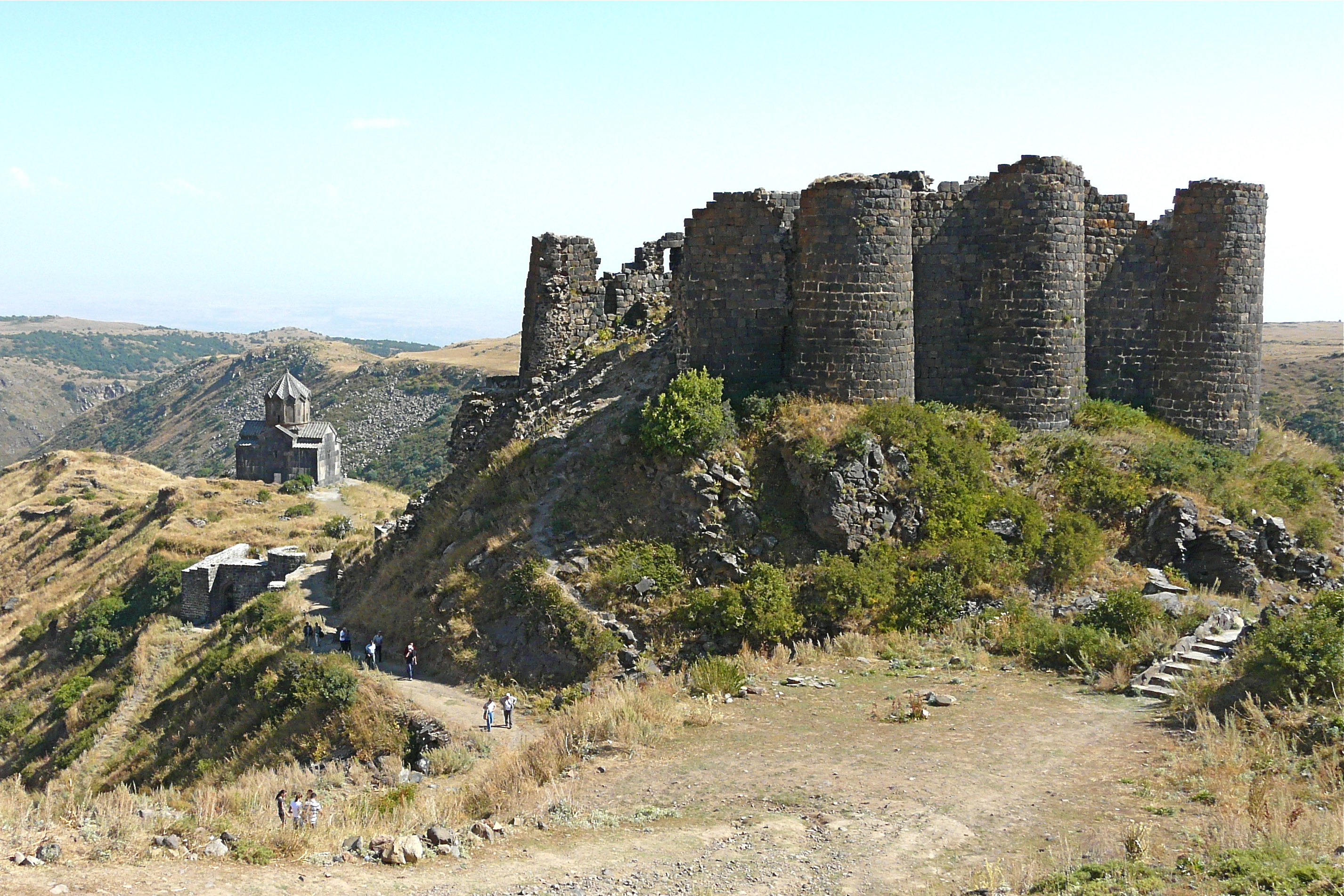 Deze vesting uit de 7de eeuw was onder de naam 'vesting van de ijzeren Ashot' bekend. Binnen de vestingsmuren bevindt zich een kleien kerk die in 1026 werd gebouwd. Een mooi voorbeeld van een vierkante kruiskerk met tamboer. zie ook